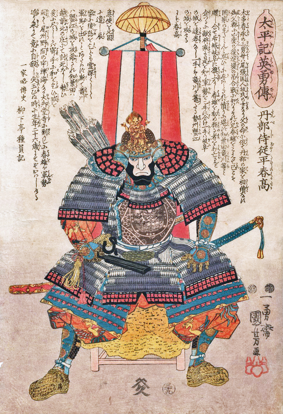 『太平記英勇傳：丹部侍従平春高』